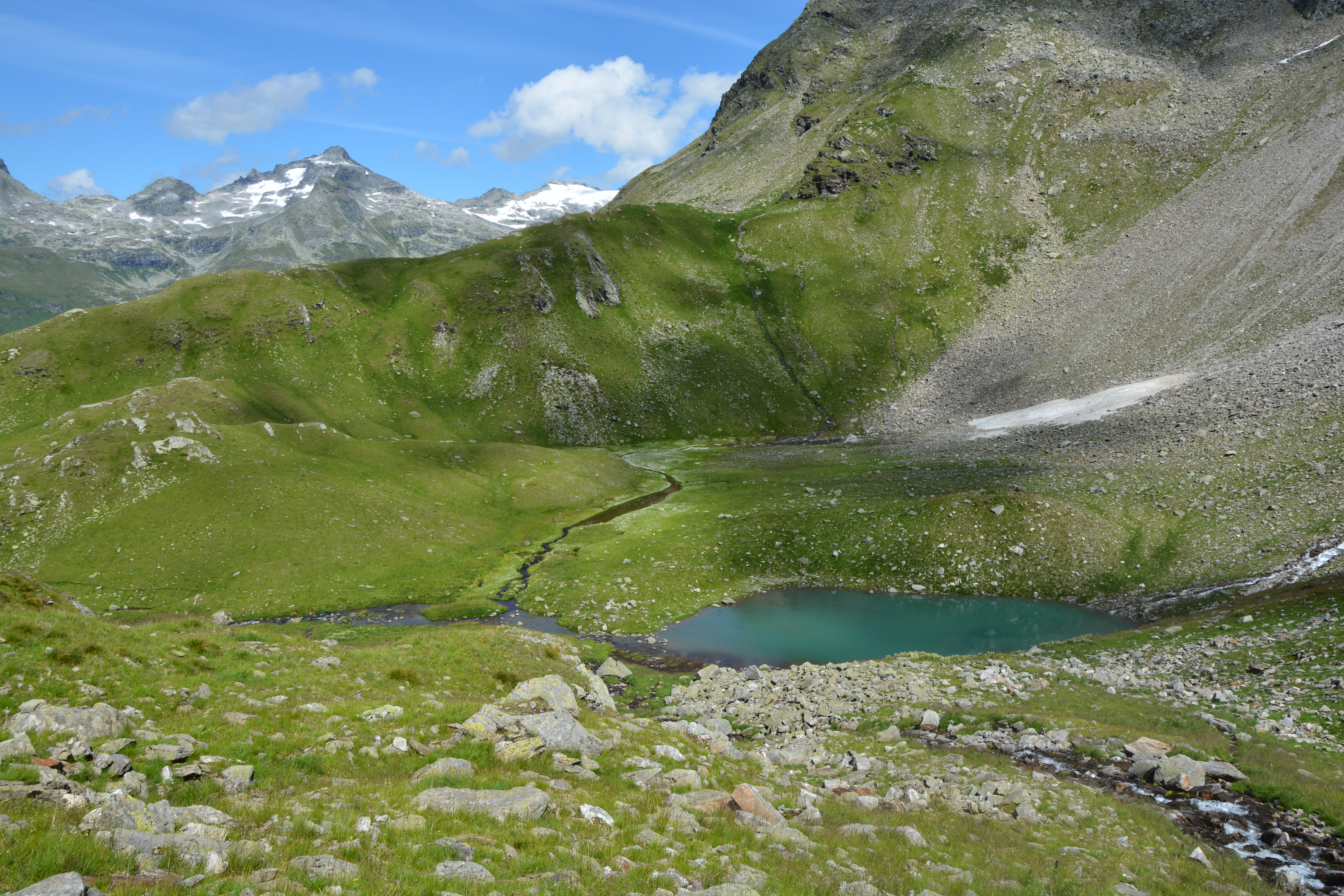 Kleiner See oberhalb des Löbbensee in Osttirol.